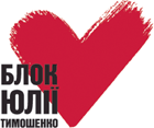 Логотип БЮТ